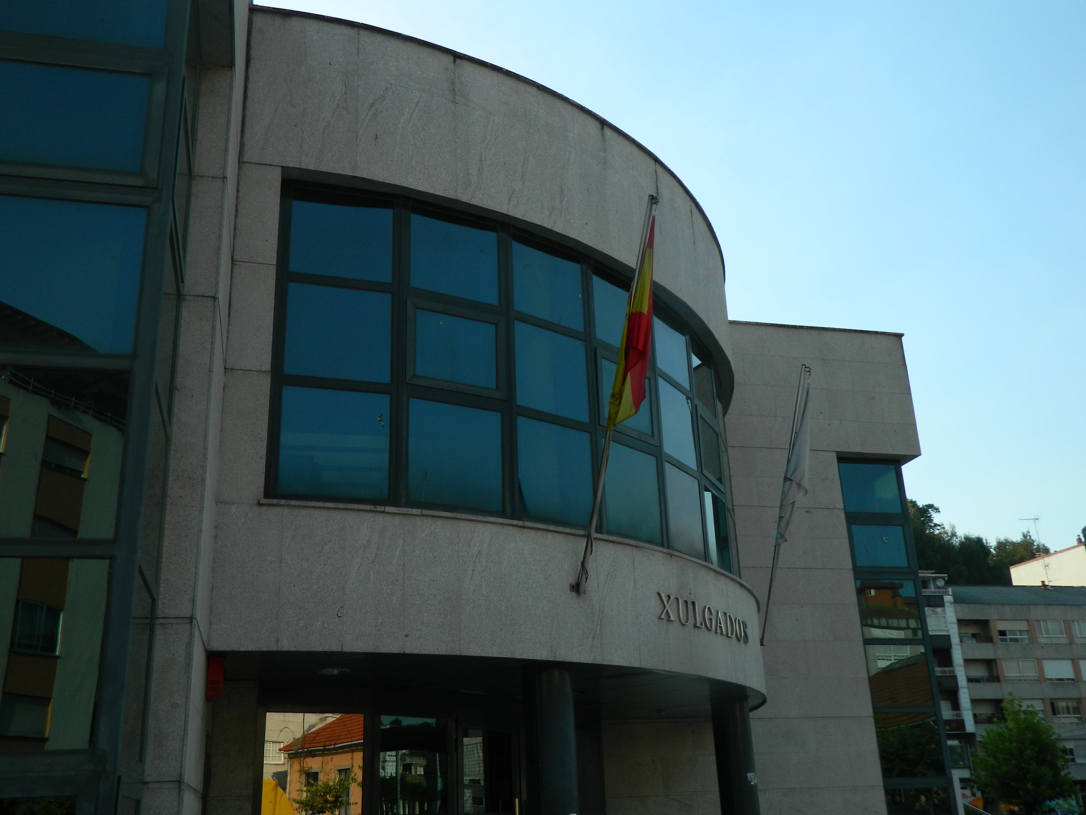 Xulgados de Redondela